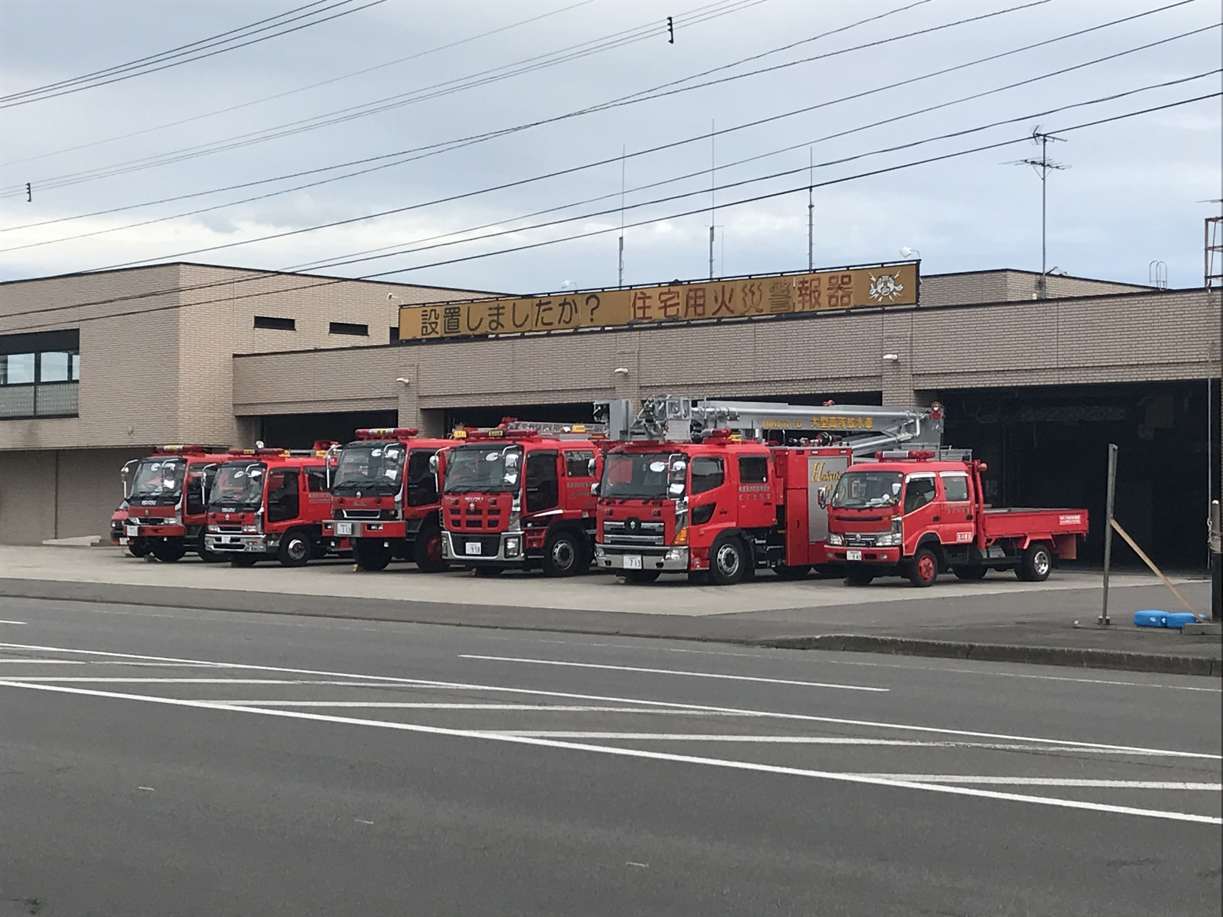 国道228号線から見た消防本部